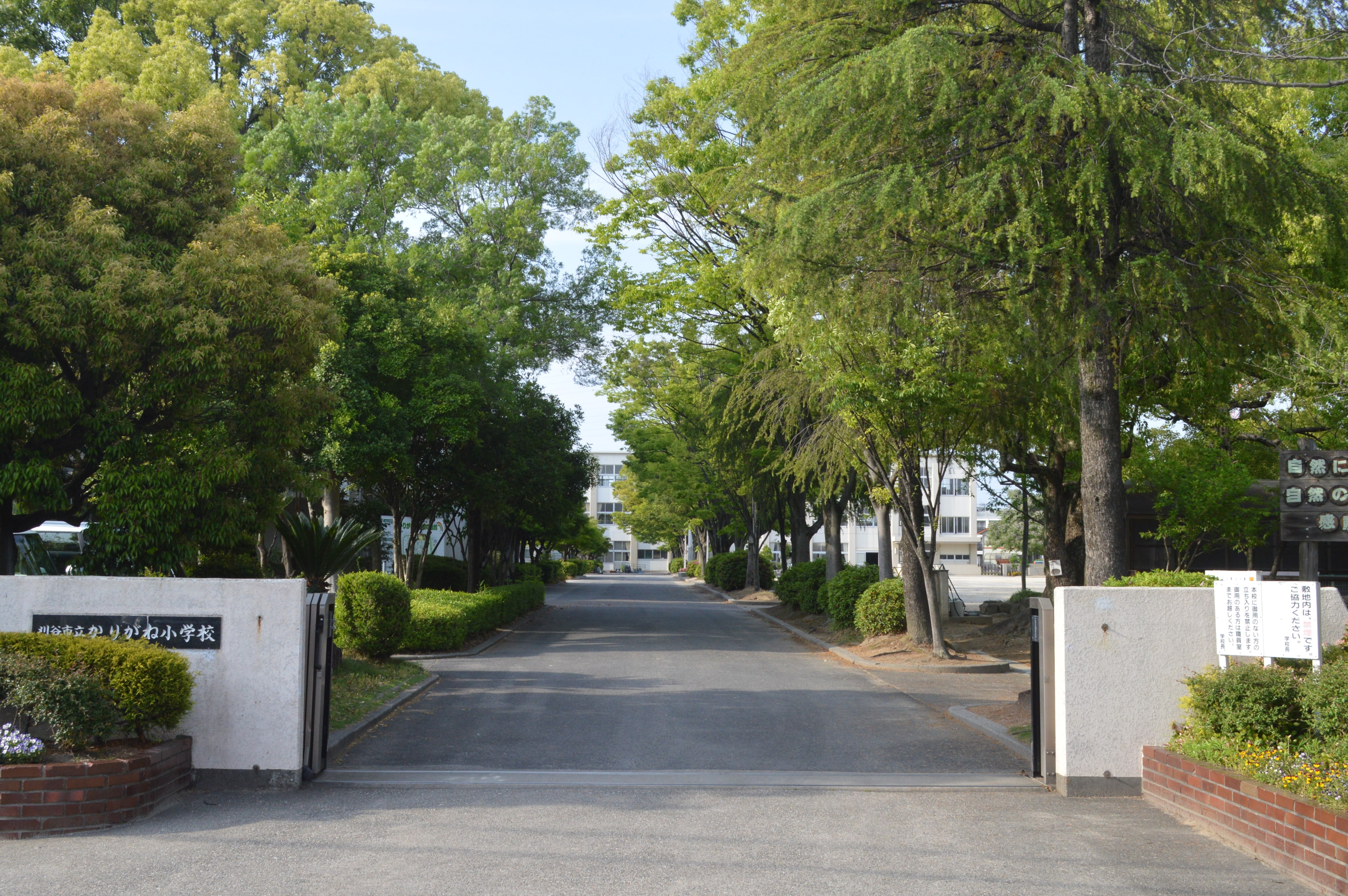 愛知県刈谷市築地町にある刈谷市立かりがね小学校。